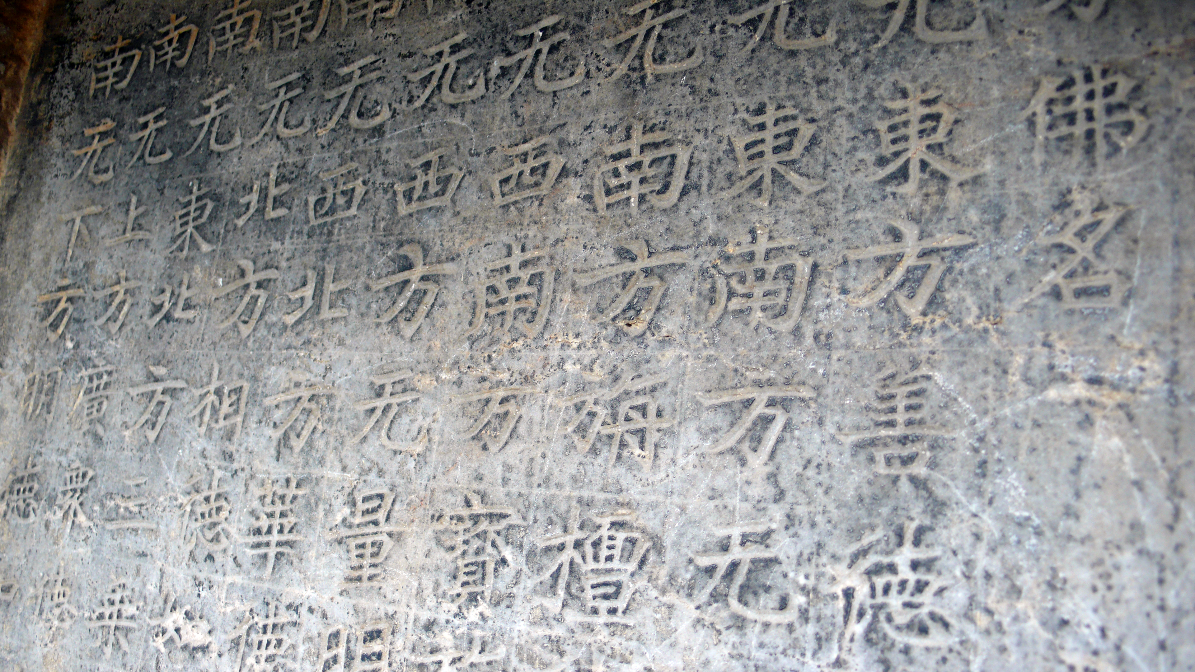 灵泉寺石窟一处窟龛。刻有十方佛名：南无东方善德如来，南无东南方无忧如来，南无南方旃檀德如来，南无西南方宝施如来，南无西方无量明如来，南无西北方华德如来，南无北方相德如来，南无东北方三乘行如来，南无上方广众德如来，南无下方明德如来。（名见于《十住毗婆沙论·易行品》）。